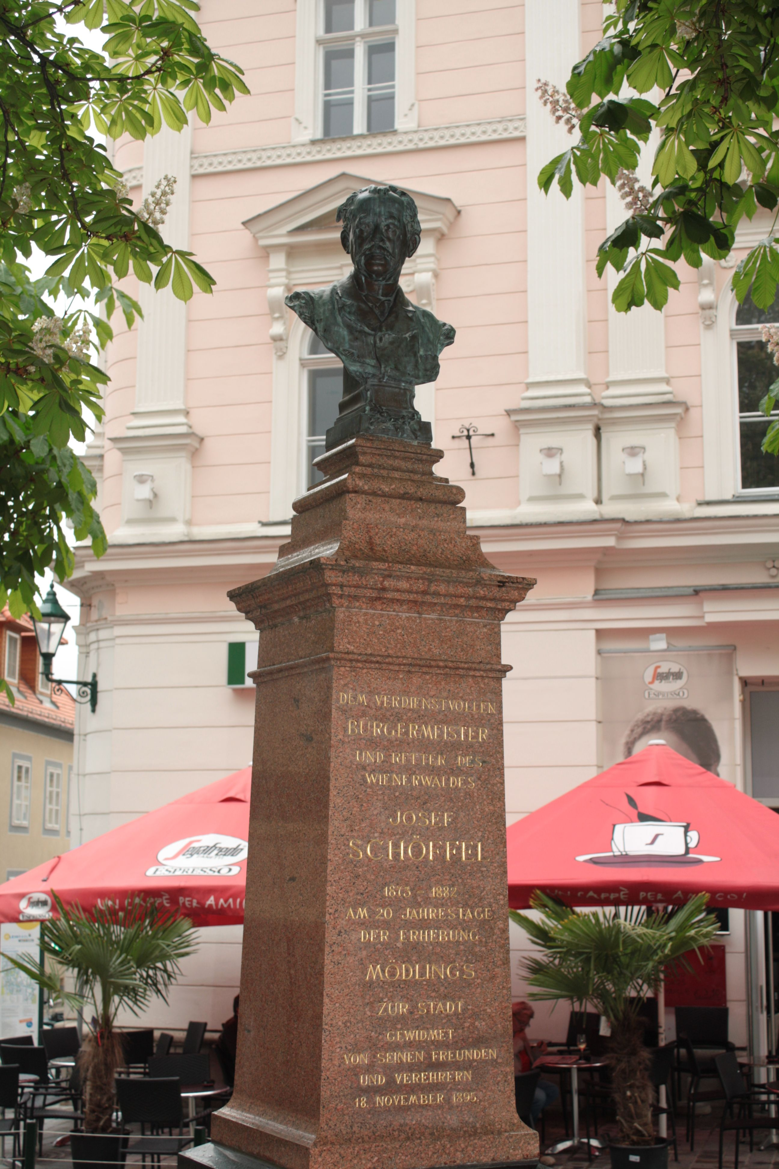 Denkmal von Josef Schöffel in Mödling